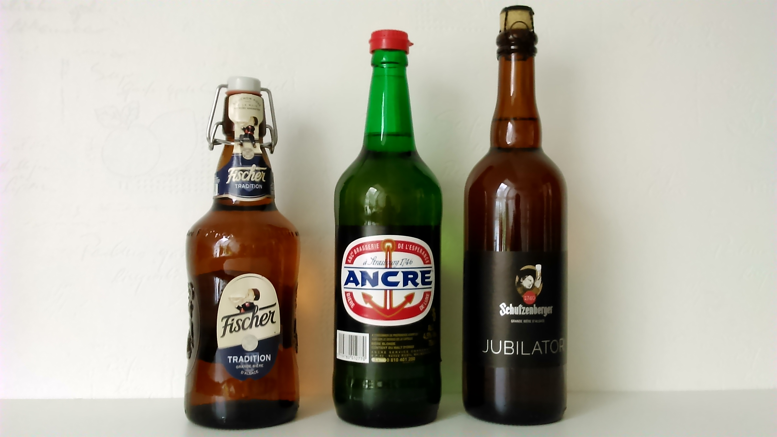 Bouteilles de Fischer Tradition, Ancre et Schutzenberger Jubilator.